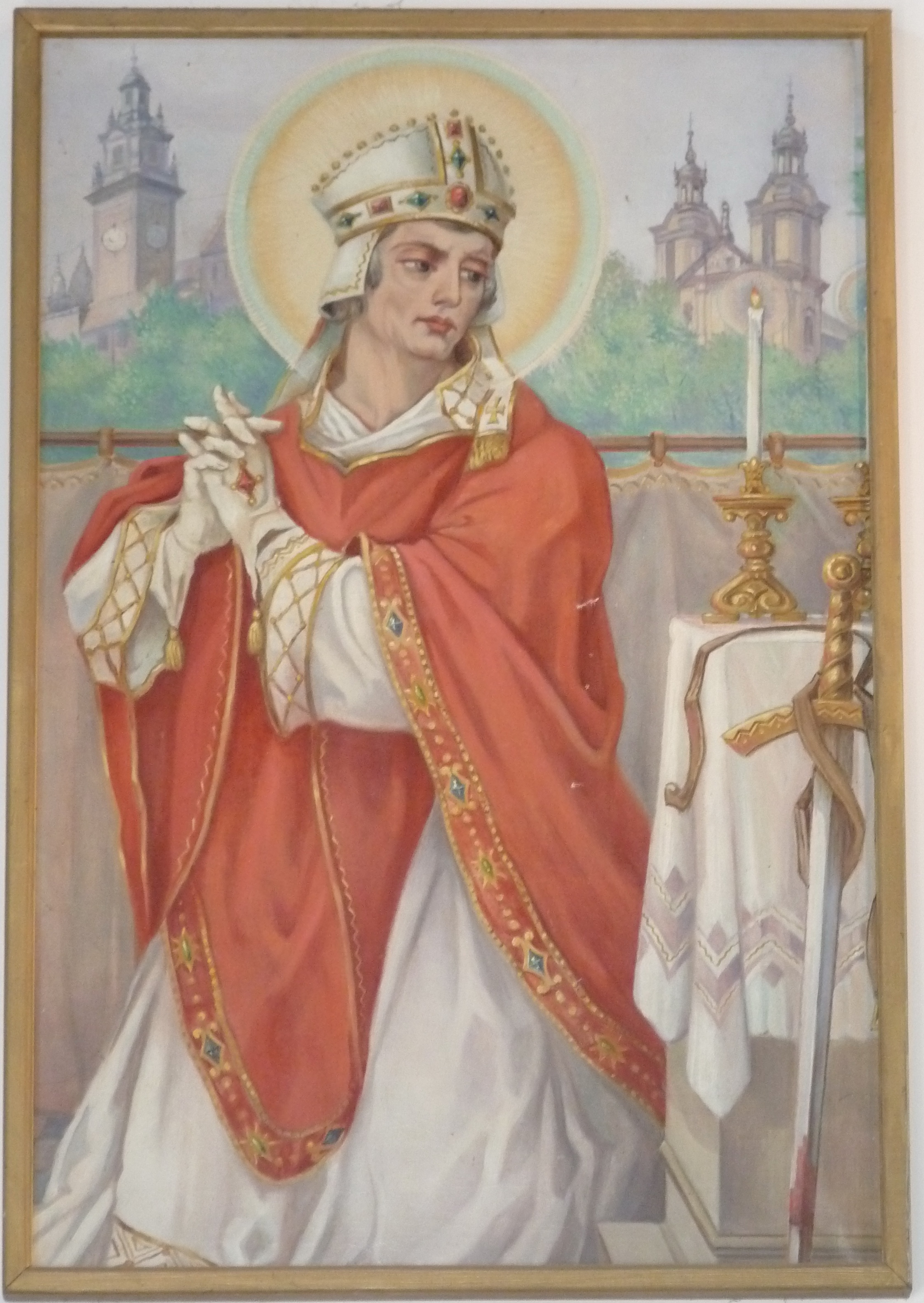 Obraz wisi w kościele w Gołaszewie. przedstawia św. Stanisława.